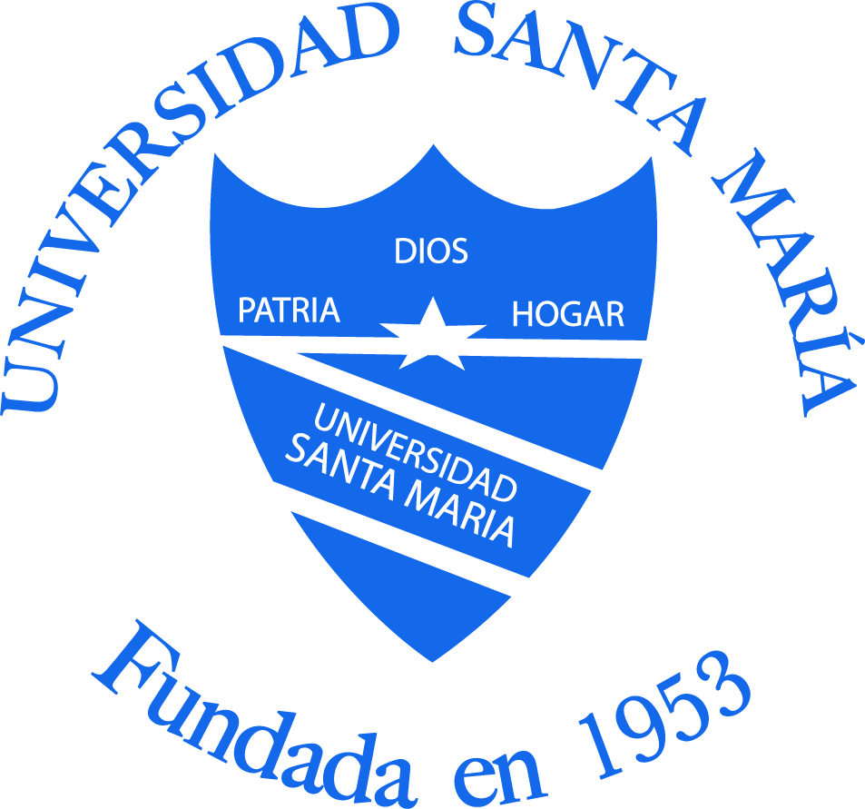 Escudo USM